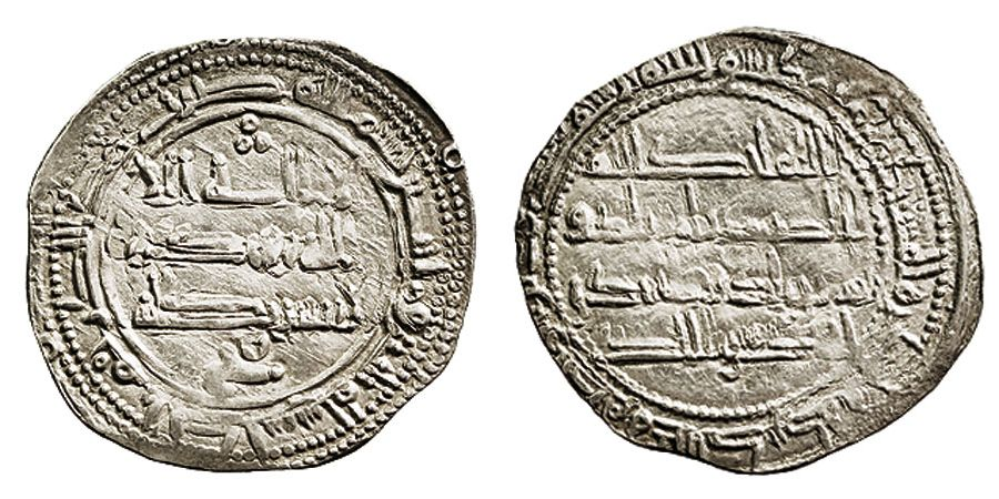 Dírham de Abd-ar-Rahman II de Còrdova, en plata. Encunyada l'any 230 de l'Hègira.